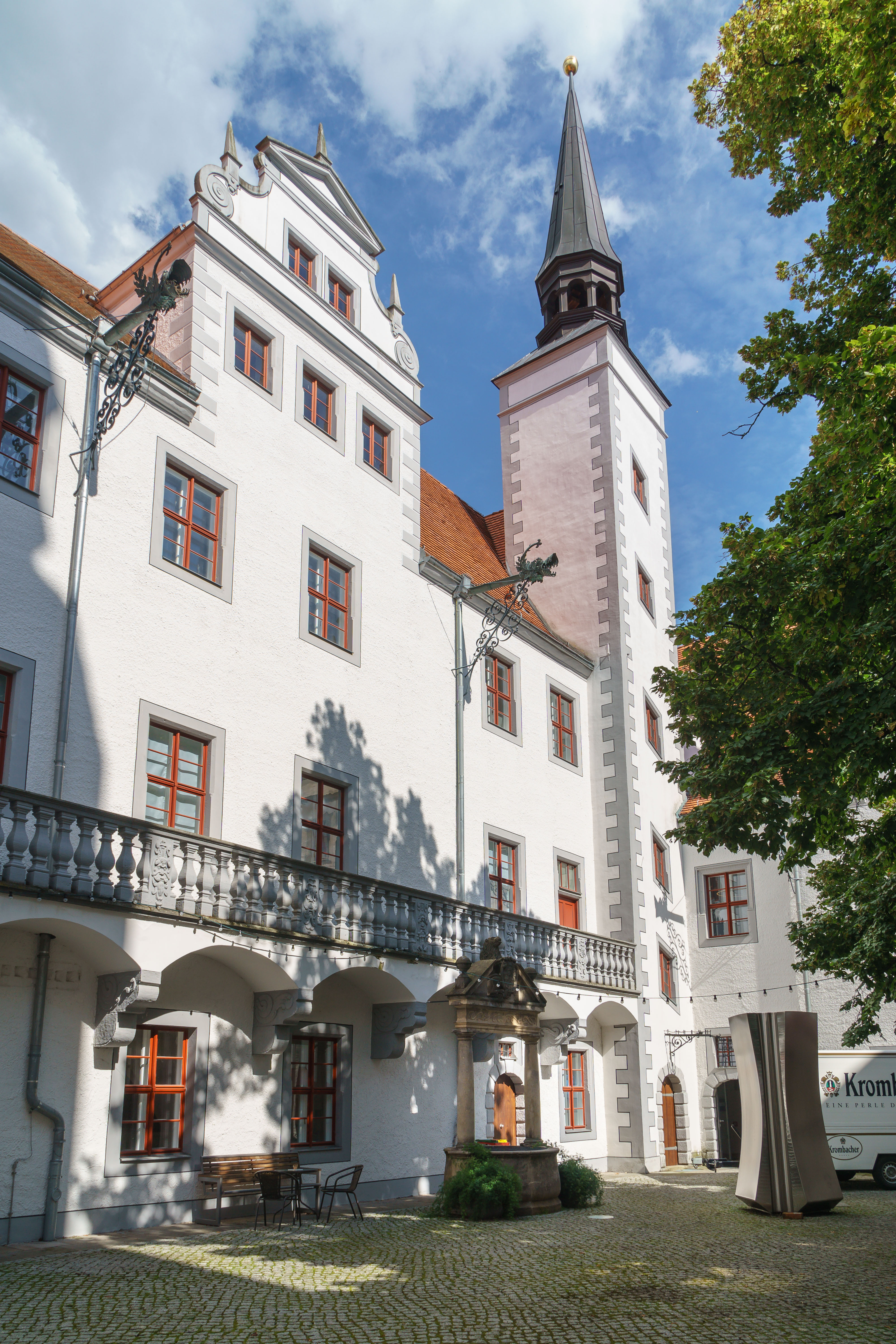 Schloss Doberlug, Brunnen auf dem Schloßhof, Schlossplatz 1 in Doberlug-Kirchhain